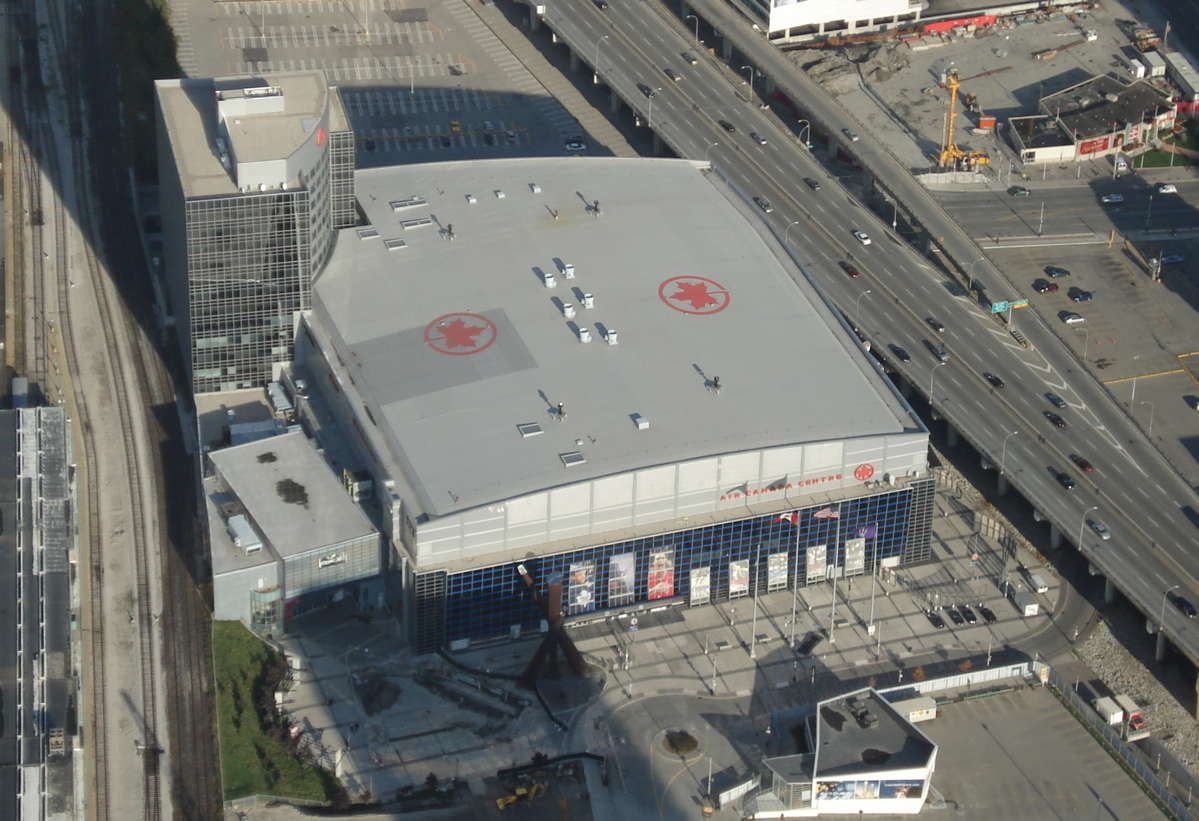 Vista del Air Canada Centre desde la Torre CN. Air Canada Center seen from the Skypod observation platform of CN Tower. Photo taken on October 15, 2006.